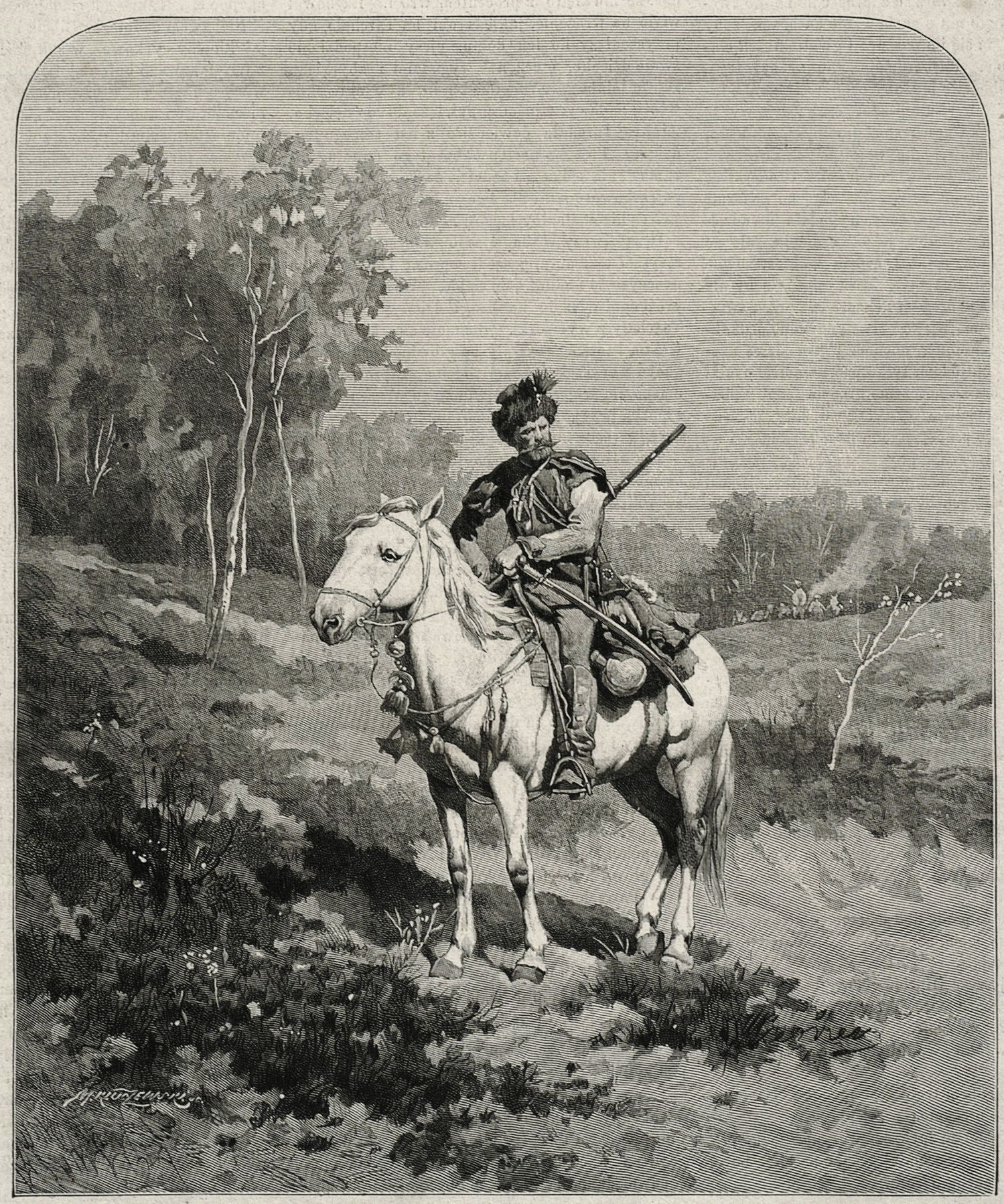 Lisowczyk na pikiecie (drzeworyt sztorcowy)